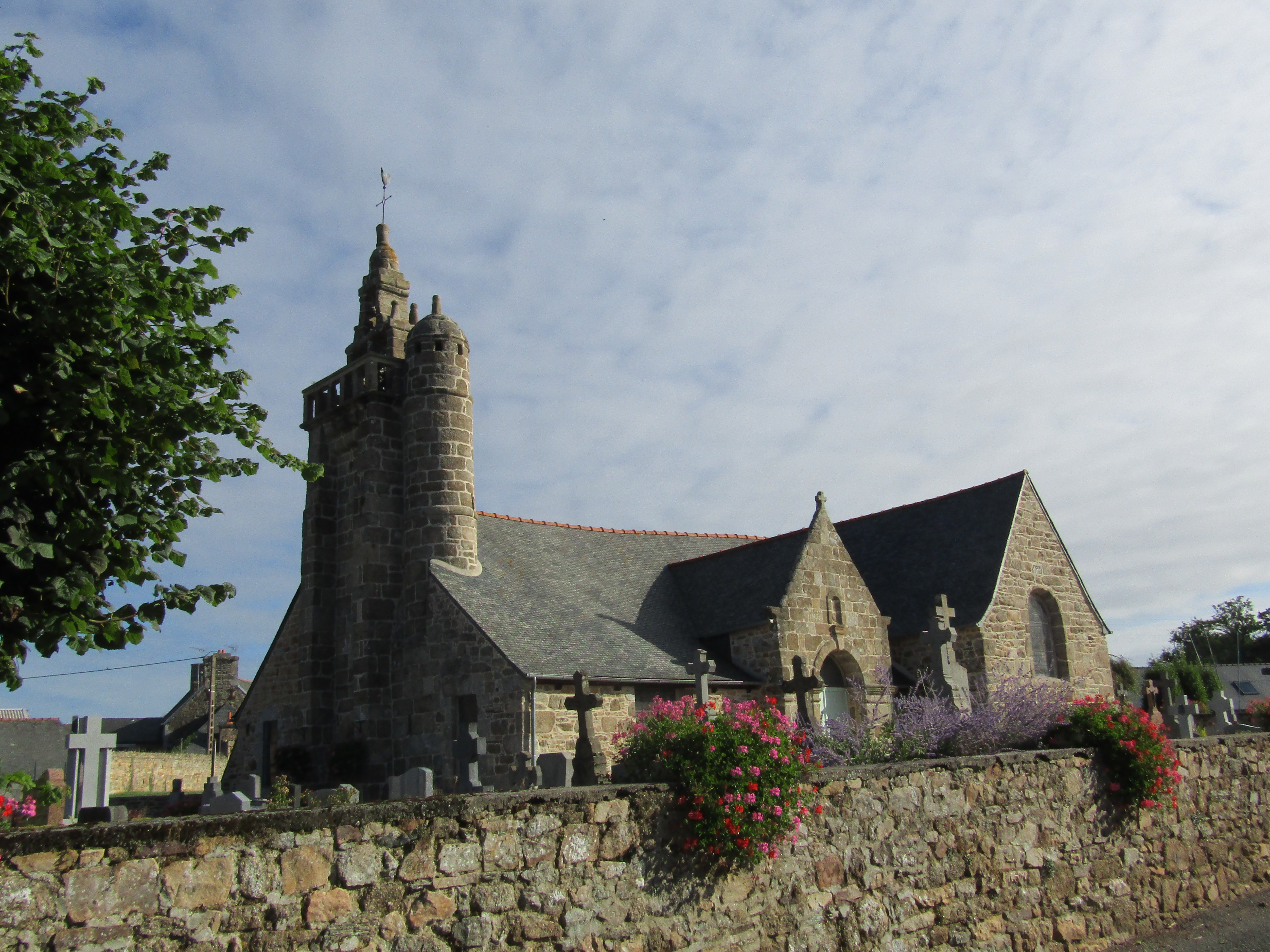 L'Eglise Saint-Mérin de Mantallot